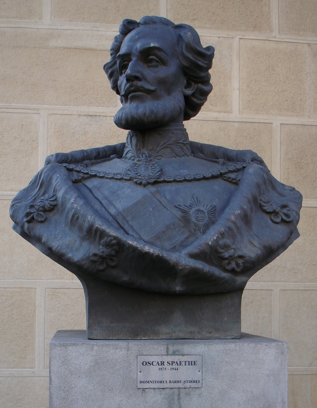 Bustul lui Barbu Ştirbei. Sculptor: Oscar Späthe (n. 1875 - d. 1944) Se află în curtea Palatului Regal din Bucureşti, care adăposteşte, în prezent, Muzeul Naţional de Artă al României